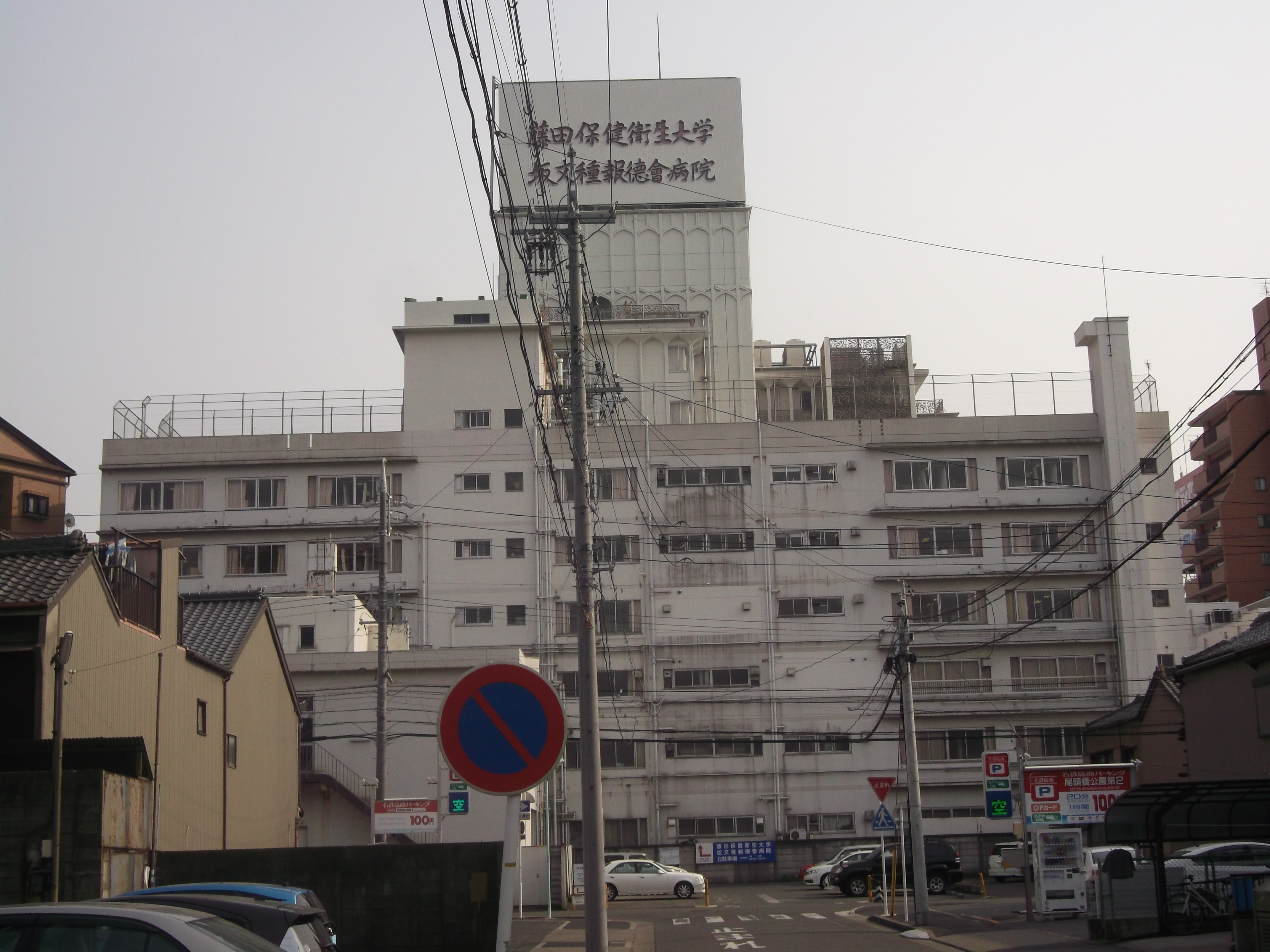 名古屋市中川区の藤田保健衛生大学坂文種報徳会病院を北側公道より撮影